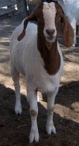 Cabra primala raza Boer